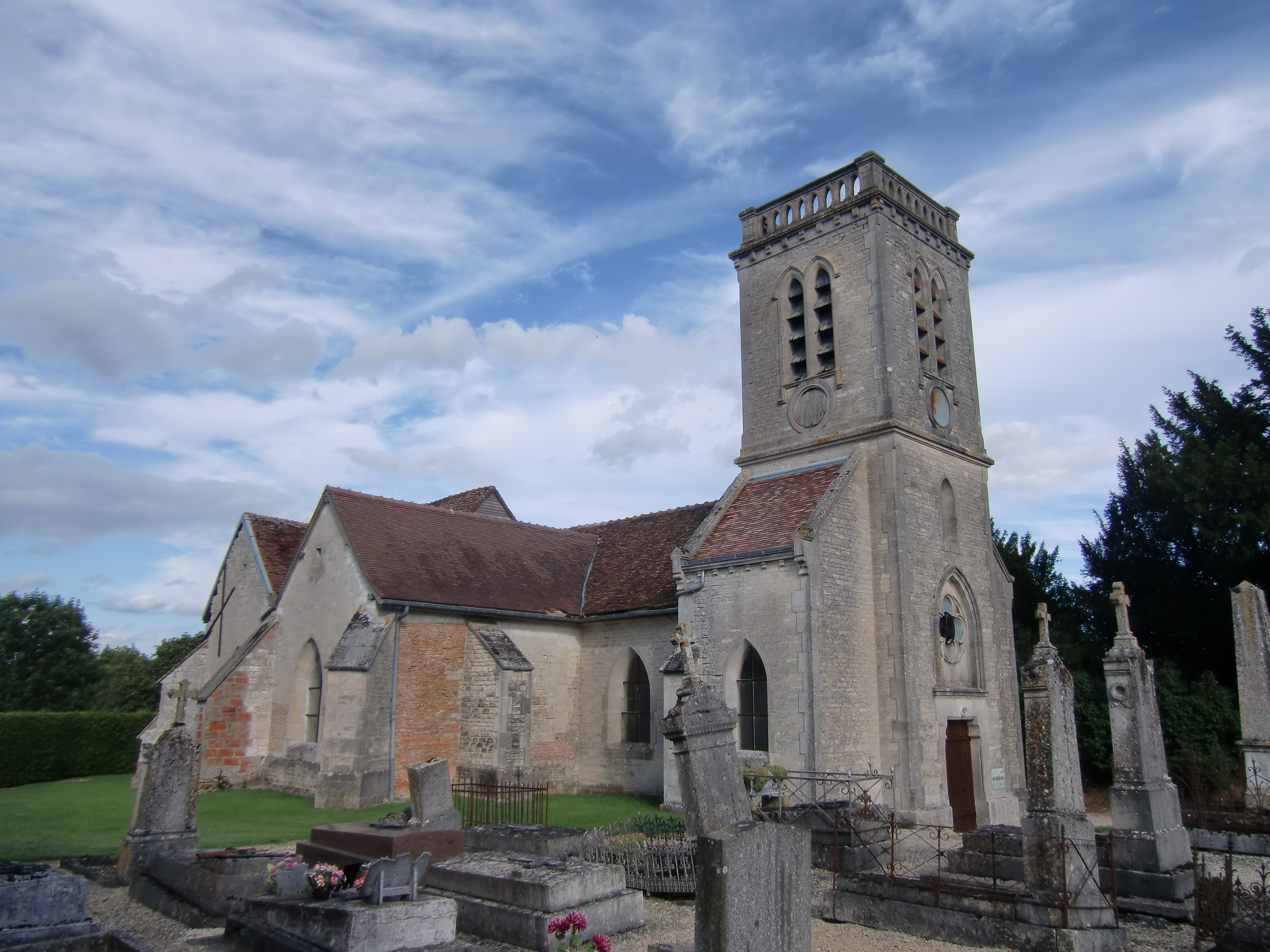 église Saint Loup de Blaincourt-sur-Aube (Aube, Champagne, France)